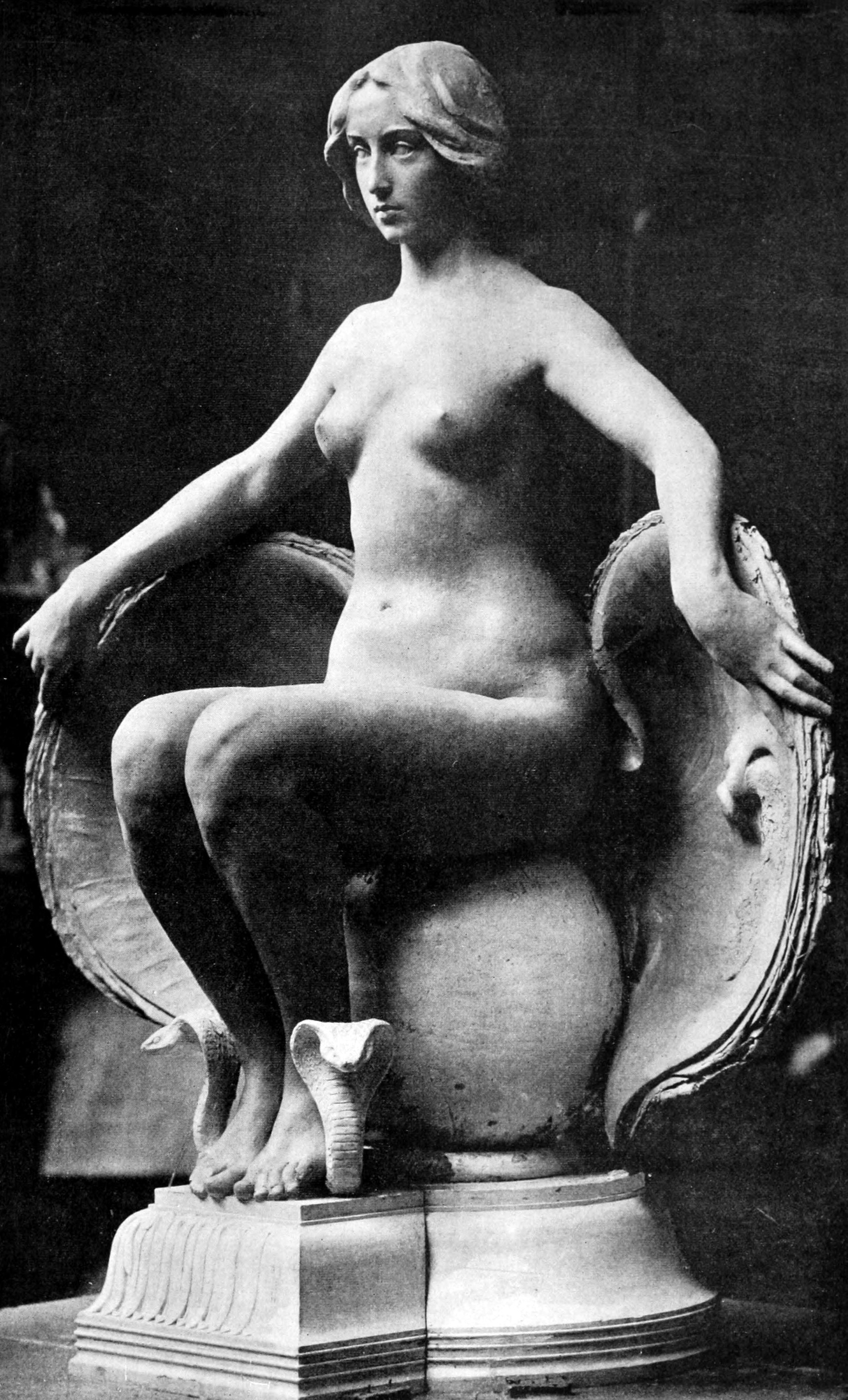 Vérité, décoration du palais des arts, Saint-Louis